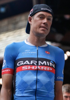 Tom Danielson en el Tour de Utah 2013